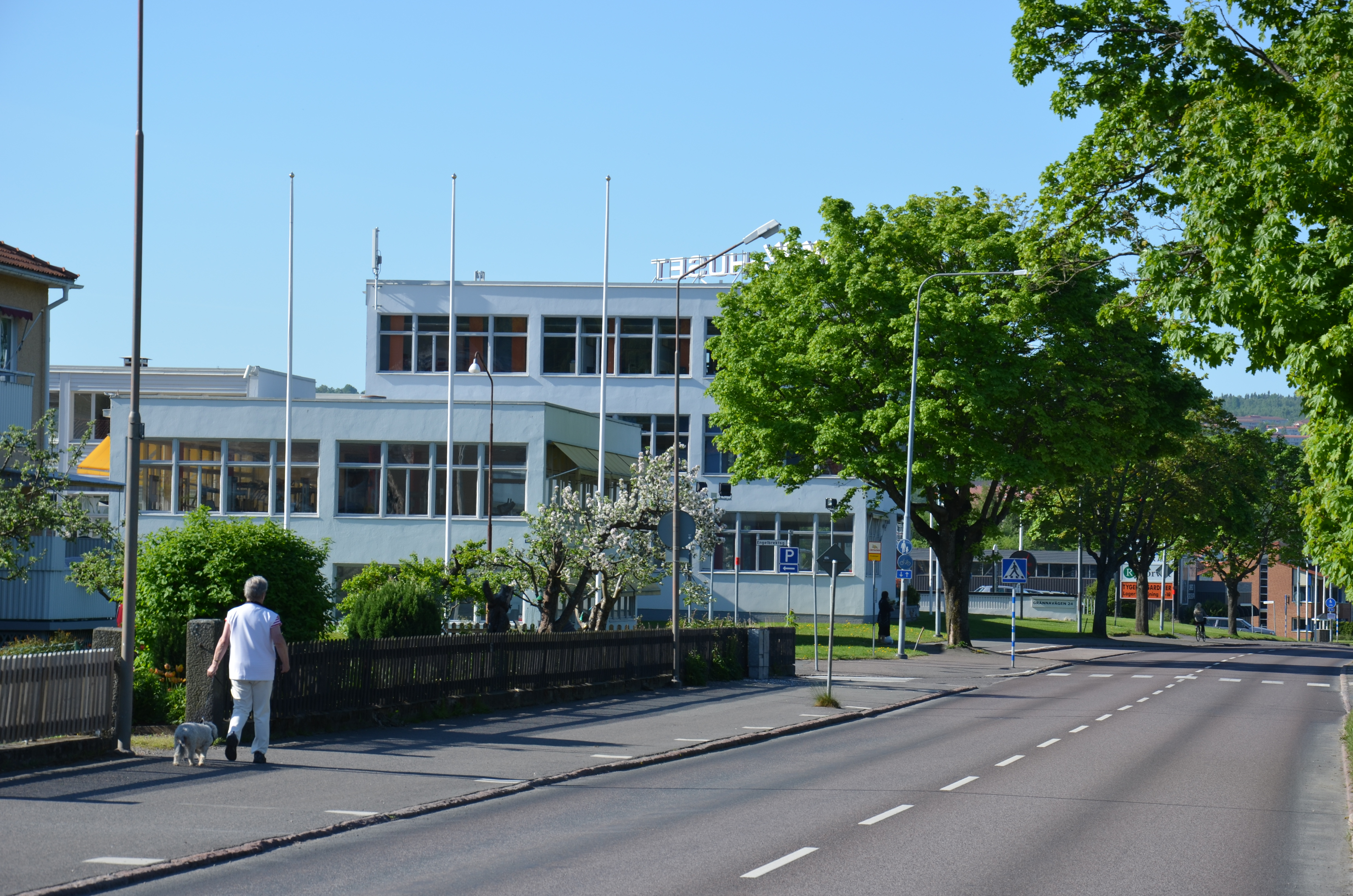 Tidigare konfektionsfabriken Junex, Grännavägen i Huskvarna, arkitekt Rolf Engströmer.